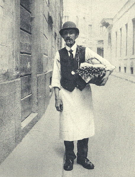 descrizione: un venditore di gamberi (1920); fonte:civica raccolta fotografica Milano